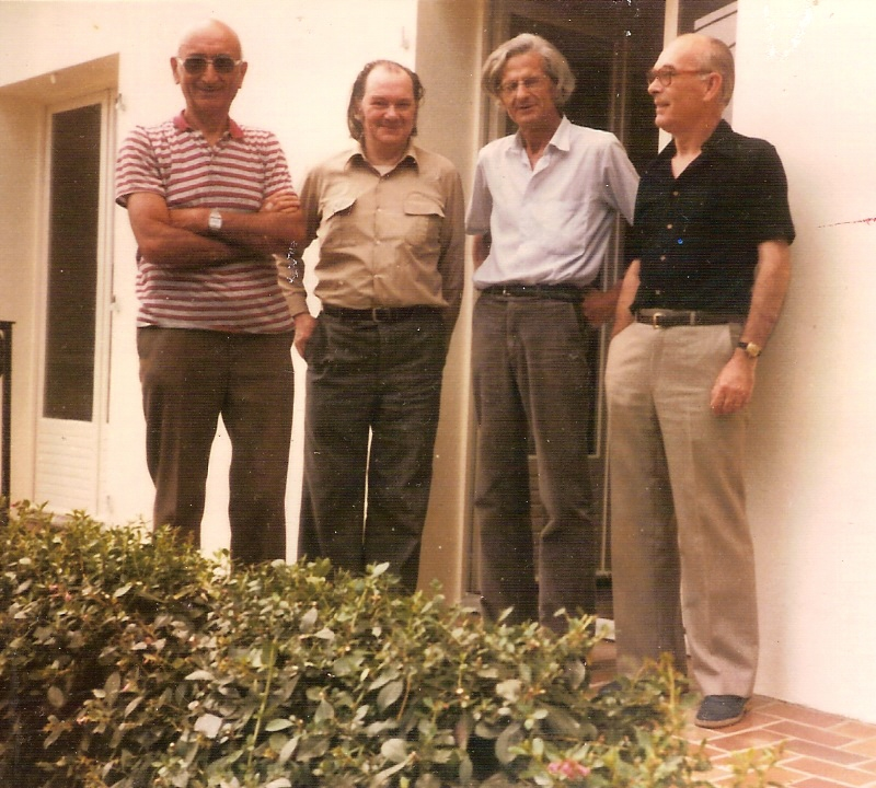 Setu amañ stag ur poltred graet e-kerzh un emvod eus skipailh Al Liamm, d'ar 17 a viz Eost 1983, e Perroz Gireg. Roll an dud war ar poltred (a gleiz da zehou): Loeiz Bihannig, Yann-Bêr d'Haese, Andrev Latimier, Ronan Huon. Gant Pêr ar Bihan 'oa bet graet ar poltred.